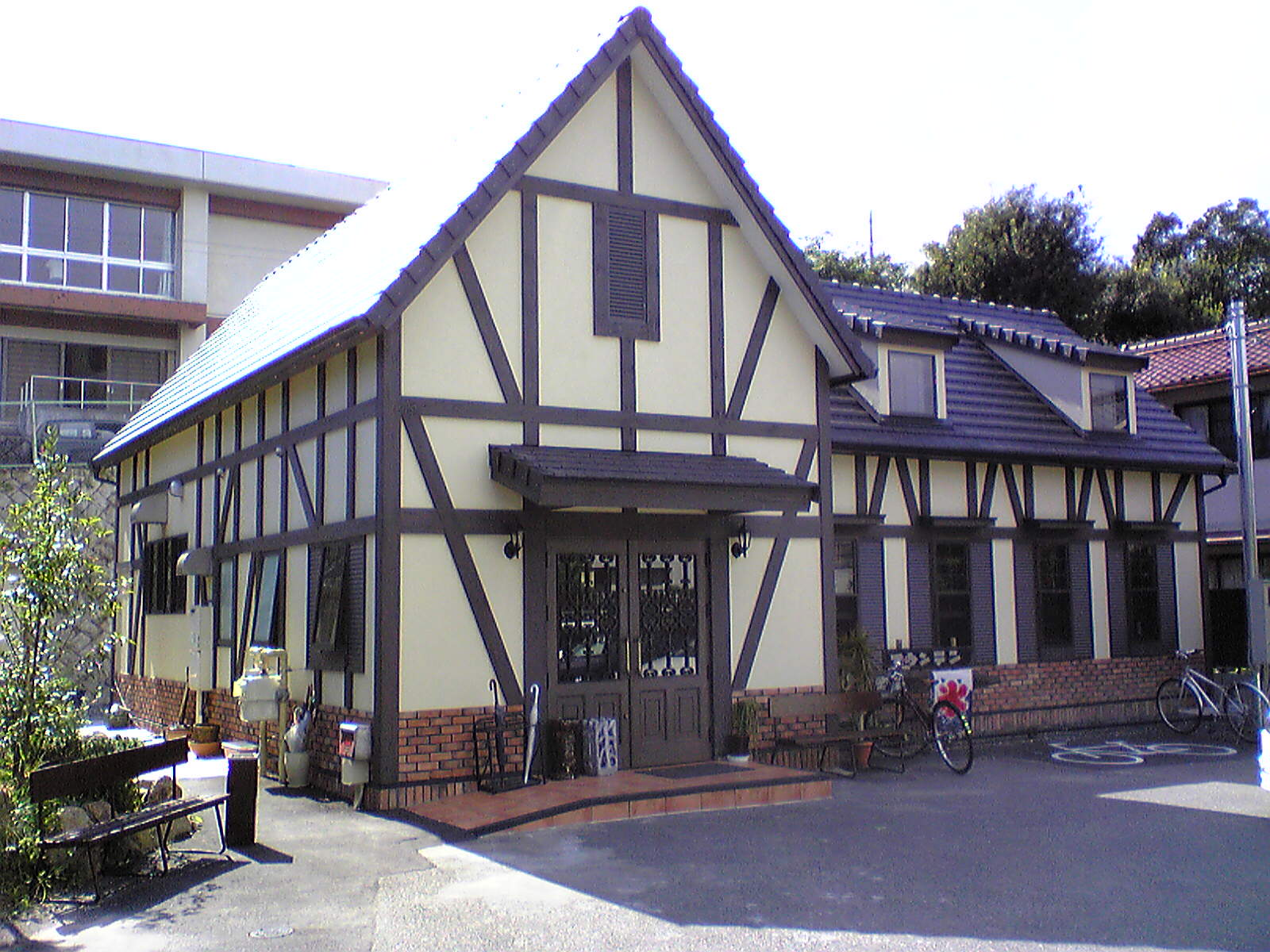 名古屋市昭和区「喫茶マウンテン」外観。2007年6月の新装後のもの。